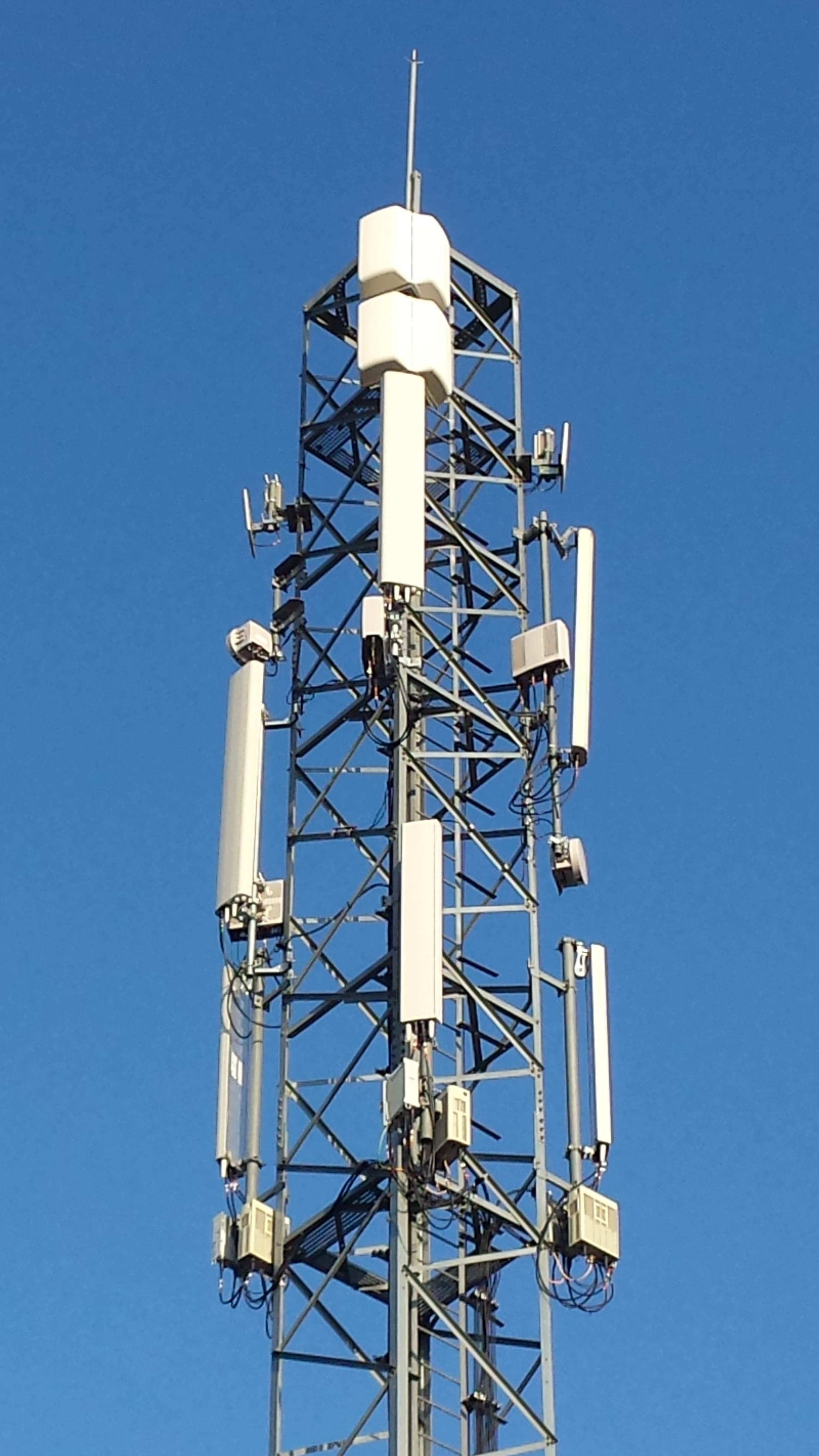 Estación base Vodafone, Movistar